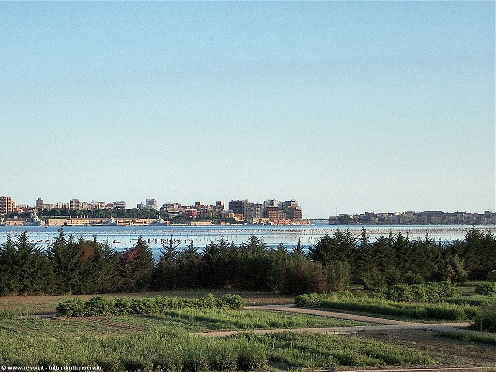 Panorama del Mar Piccolo di Taranto - Foto concessa dall'Autore - Il Sig. Gaspare Ressa, detentore del copyright sull'immagine, ha esplicitamente rilasciato l'immagine con Licenza Arte Libera e mi ha autorizzato a caricarla su Wikipedia con tale licenza.